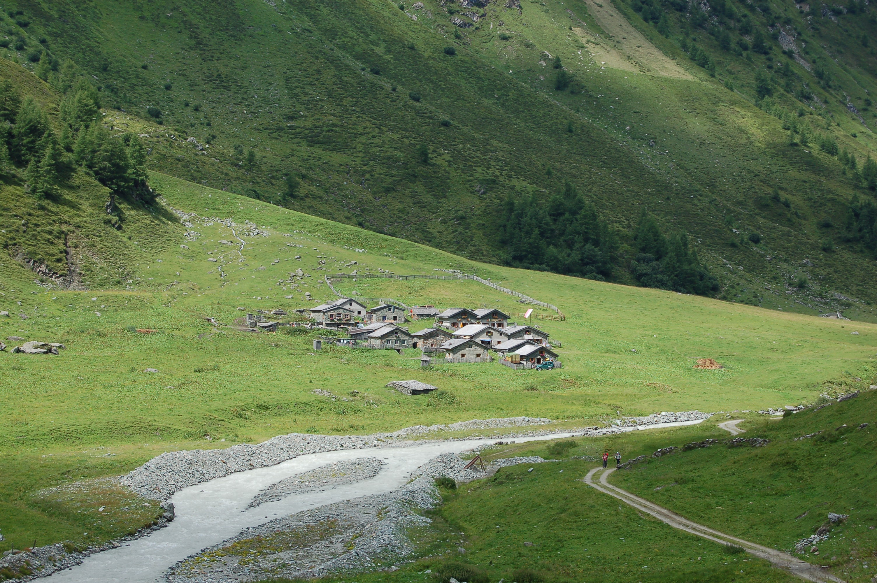 Die Zedlacher Alm im Nationalpark Hohe Tauern, Gemeinde Matrei in Osttirol, Bezirk Lienz. This file shows the National Park Hohe Tauern in Austria.